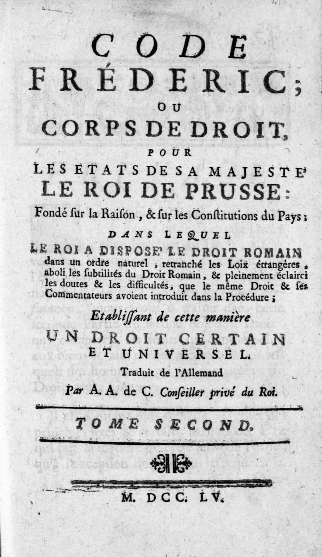 Frontespizio